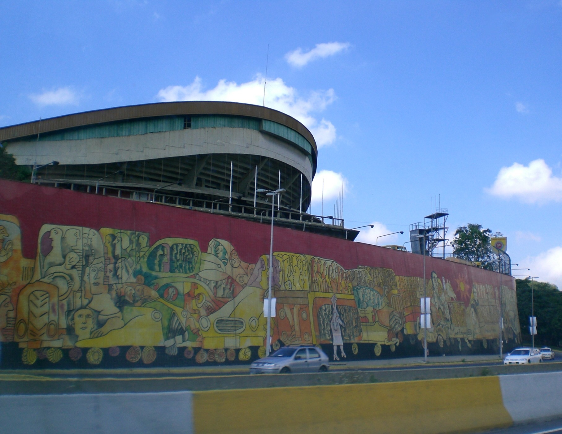 Pedro León Zapata´s Los Conductores del País Mural, Caracas, Venezuela